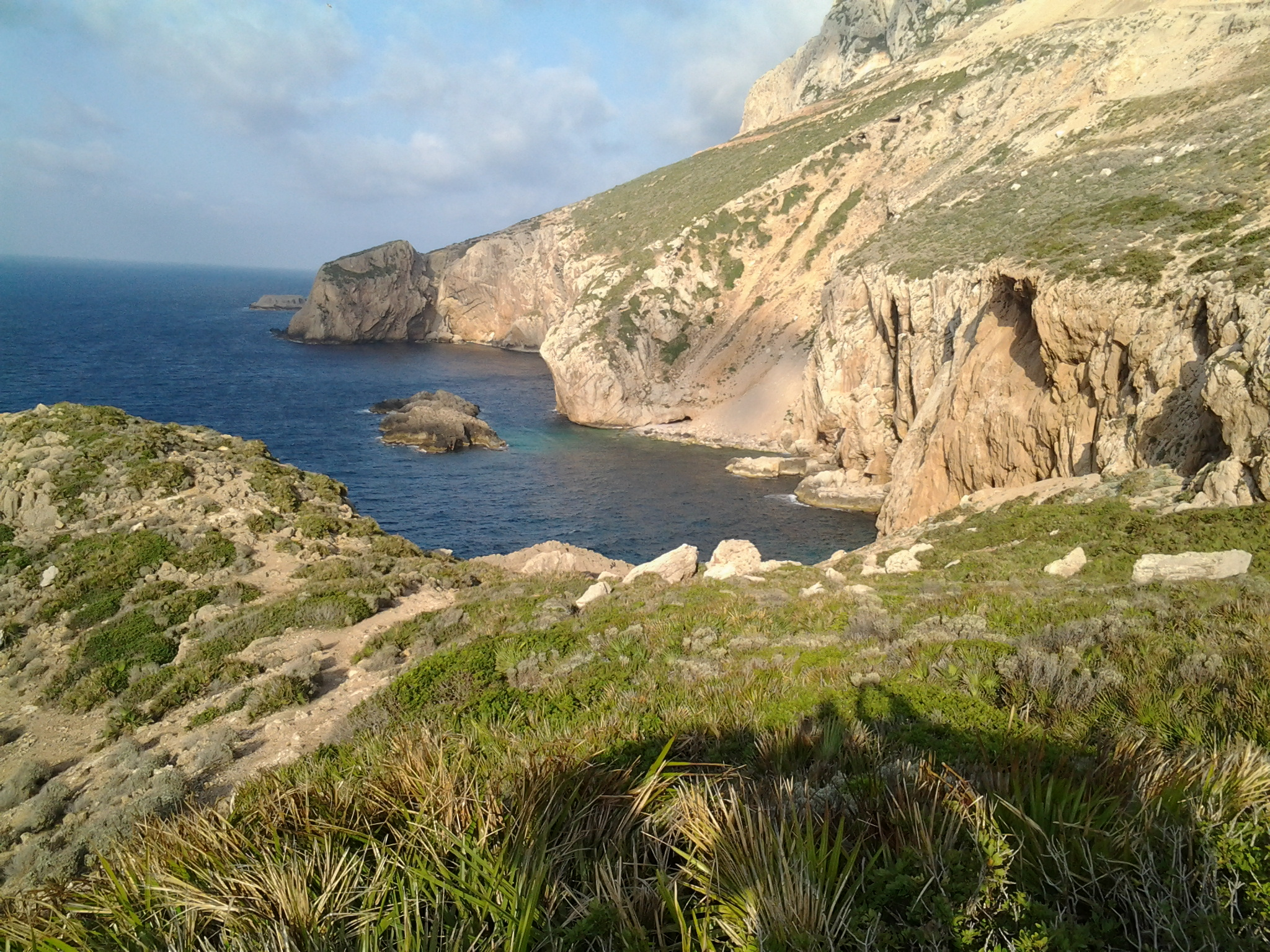 image